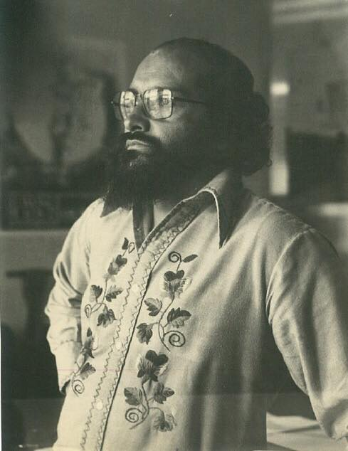 Ulises Estrella, poeta escritor y cineasta ecuatoriano del movimiento tzánsico